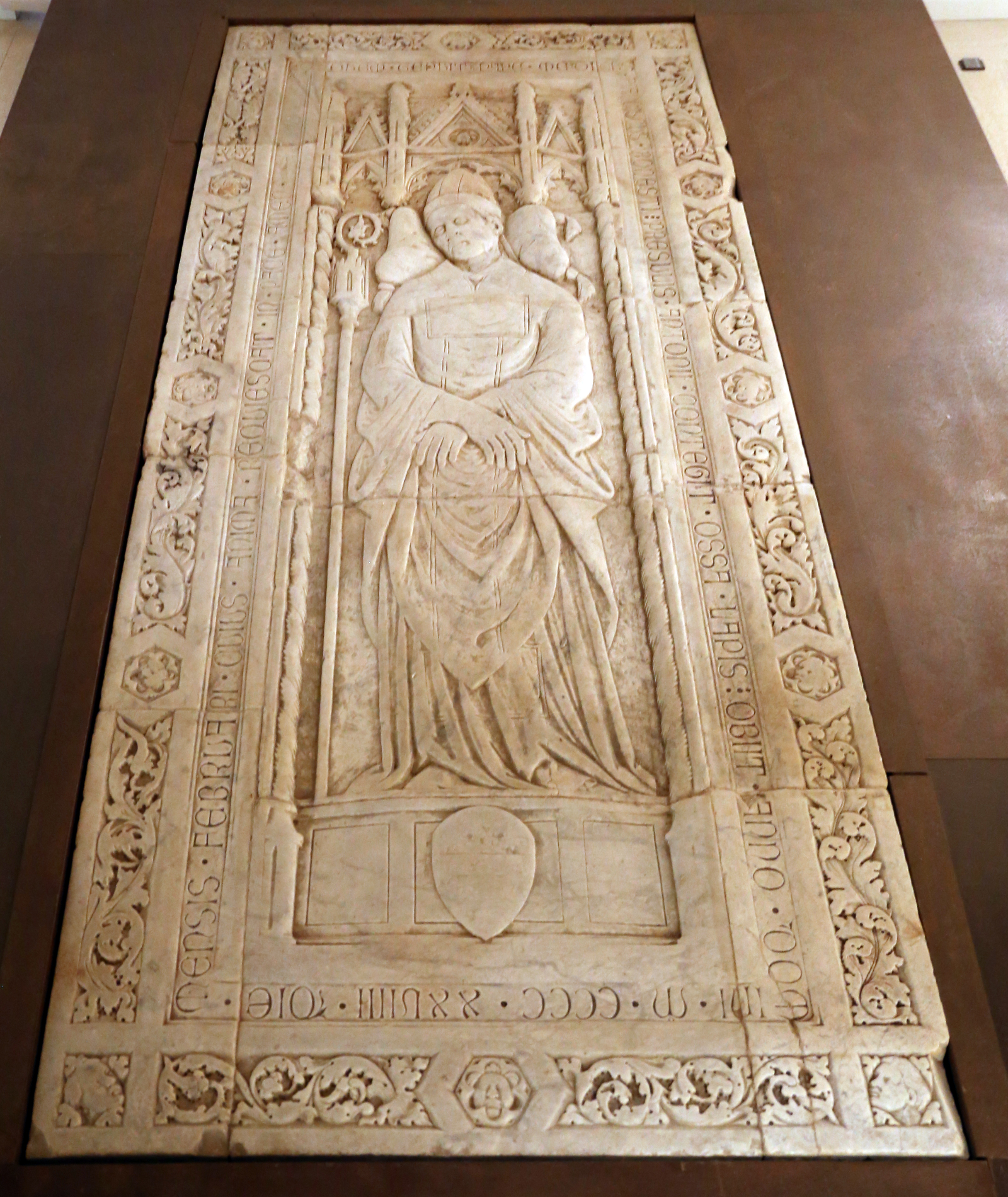 Museo di Arte Sacra (Massa Marittima) This is a photo of a monument which is part of cultural heritage of Italy.